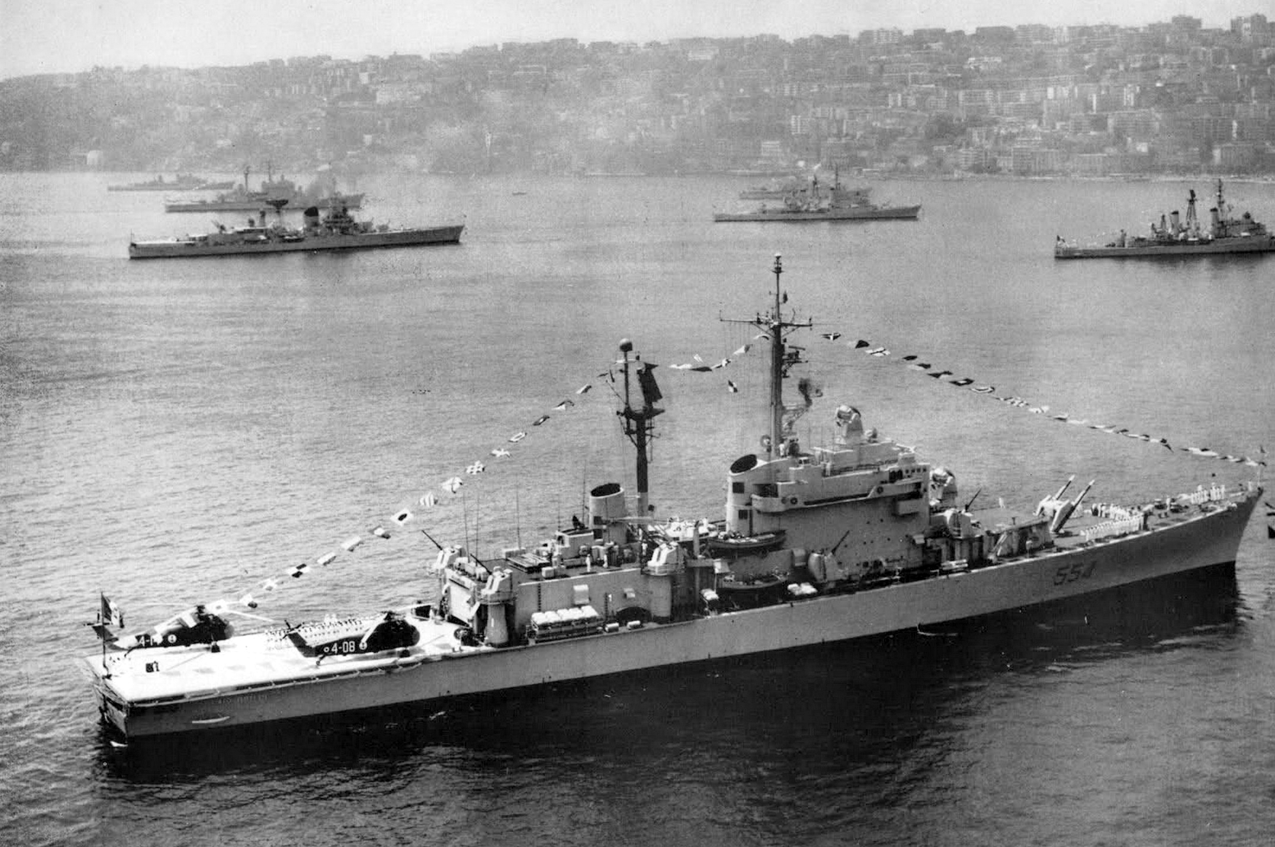 La squadra navale alla fonda nel golfo di Napoli durante la Rivista navale alla presenza del Capo dello Stato in occasione del cinquantenario della vittoria, in primo piano l'incrocistore lanciamissili Caio Duilio